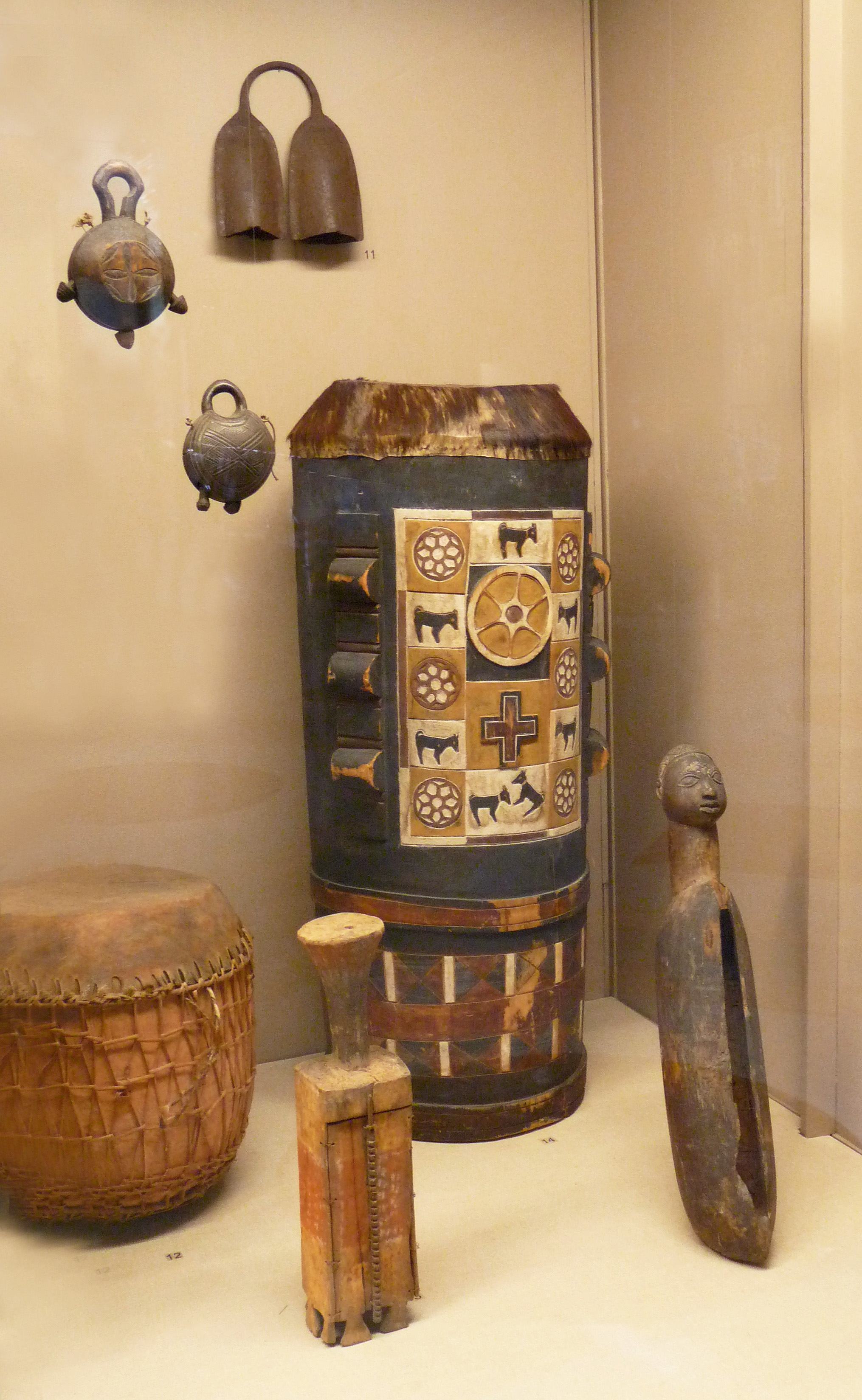 Kongo : instruments de musique. Au centre, grand tambour dont la caisse de résonance est décorée de motifs géométriques et animaliers, utilisé pour les cérémonies religieuses et les évènements liés au roi ; entouré d'un tambour plus petit, d'un tambour à fente (à droite), d'un racloir (au premier plan) et de diverses cloches (sur le mur). Musée royal de l'Afrique centrale